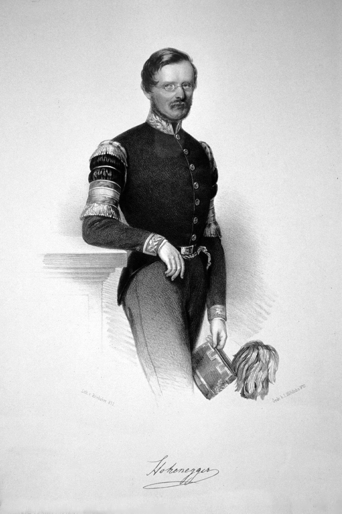 Ludwig Hohenegger (1807-1864) Geologe, Hüttenmann. Lithographie von Josef Kriehuber, 1853